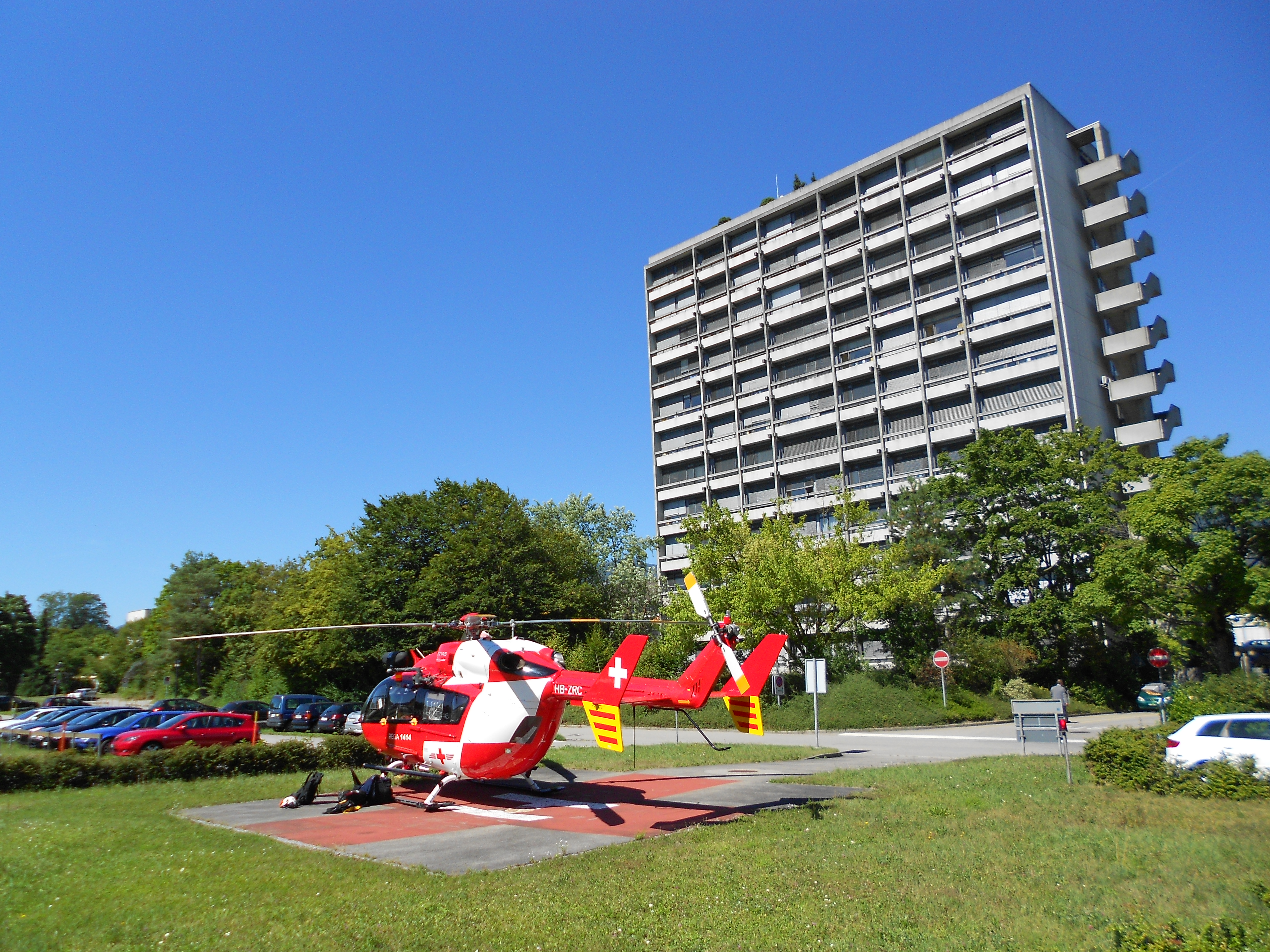 Rega Helikopter vor dem Bürgerspital Solothurn